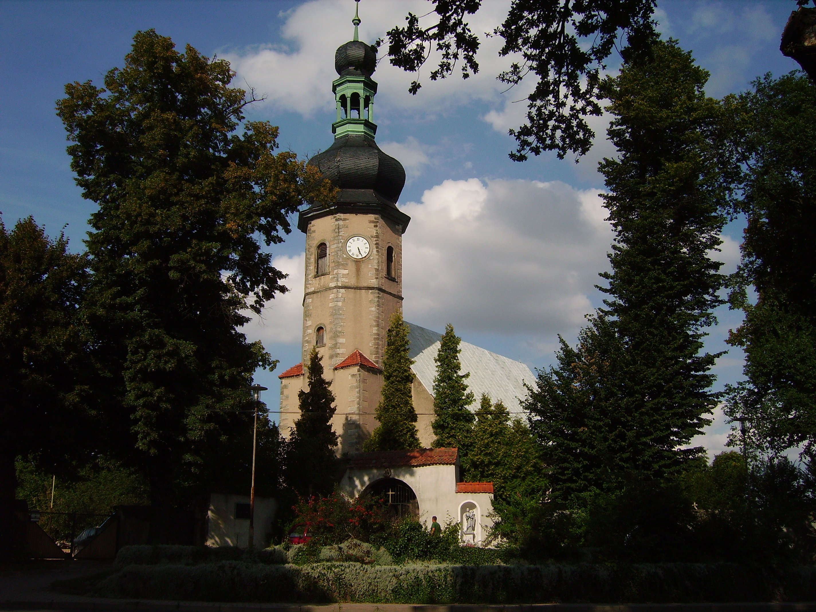 Nowogrodziec - rzymskokatolicki kościòł filialny p.w. św. Mikołaja, XIV, 1827, XIX